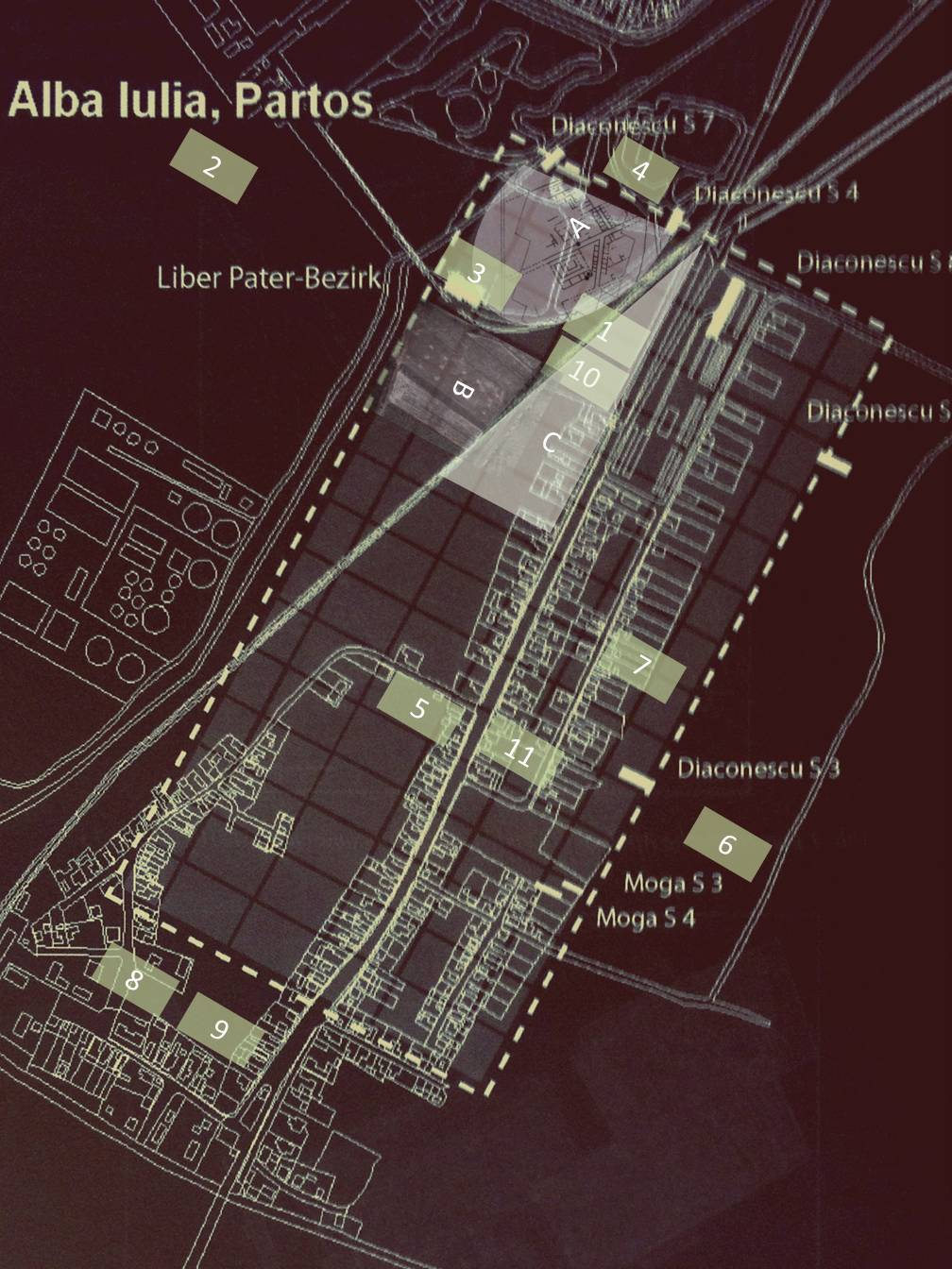 A Marosportus alatt nyugvó római város modellje és főbb, kiásott részei. Forrás: Szabó Csaba, Béla Cserni and the beginning of urban archaeology in Alba Iulia, Cluj-Napoca, 2016.